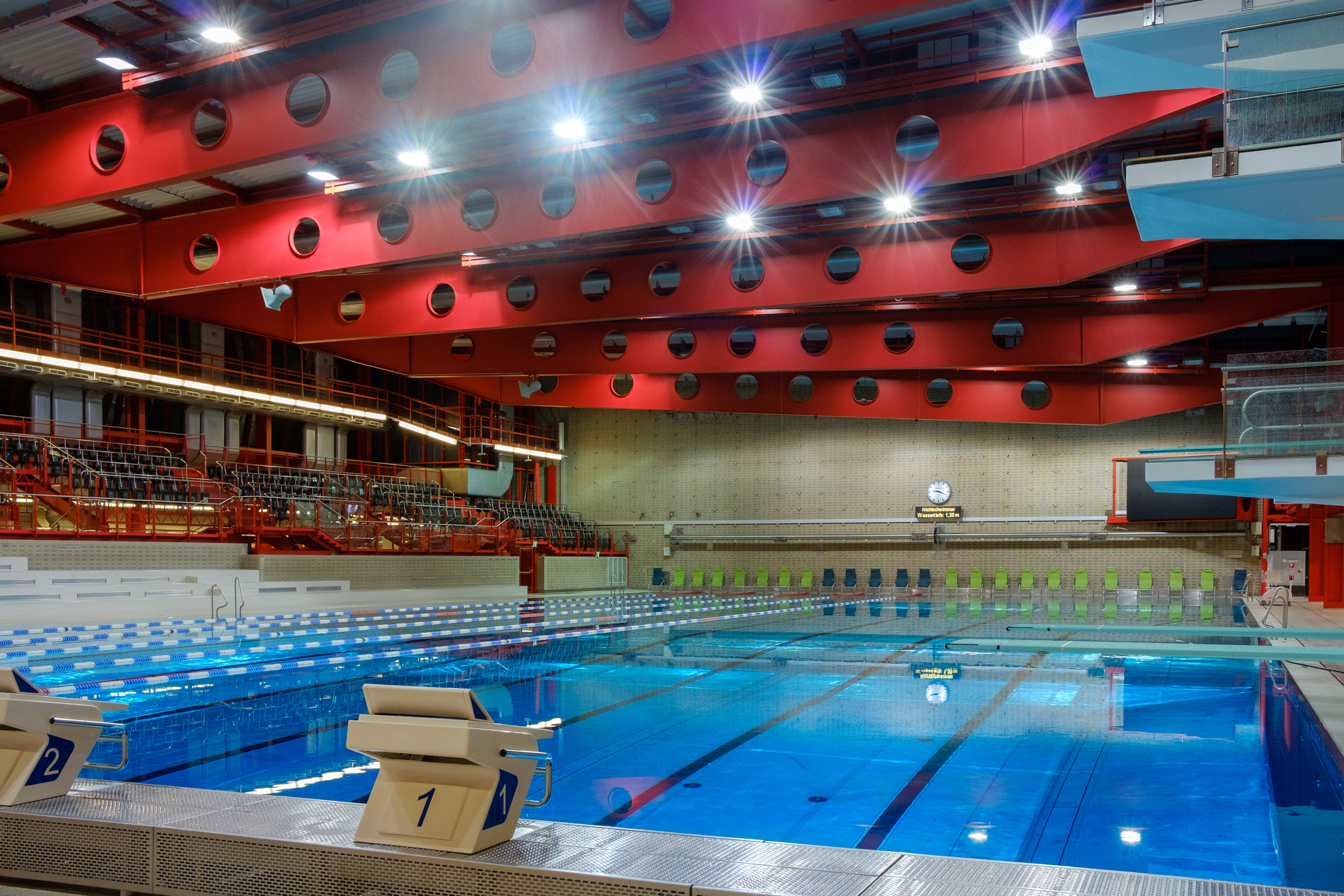 Das große Schwimmbecken im Wiener Stadthallenbad nach den langjährigen Renovierungsarbeiten (2015). Gut zu sehen sind die neuen Startsockeln am Beckenrand.